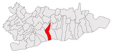 Categorie:Hărţi ale judeţului Călăraşi